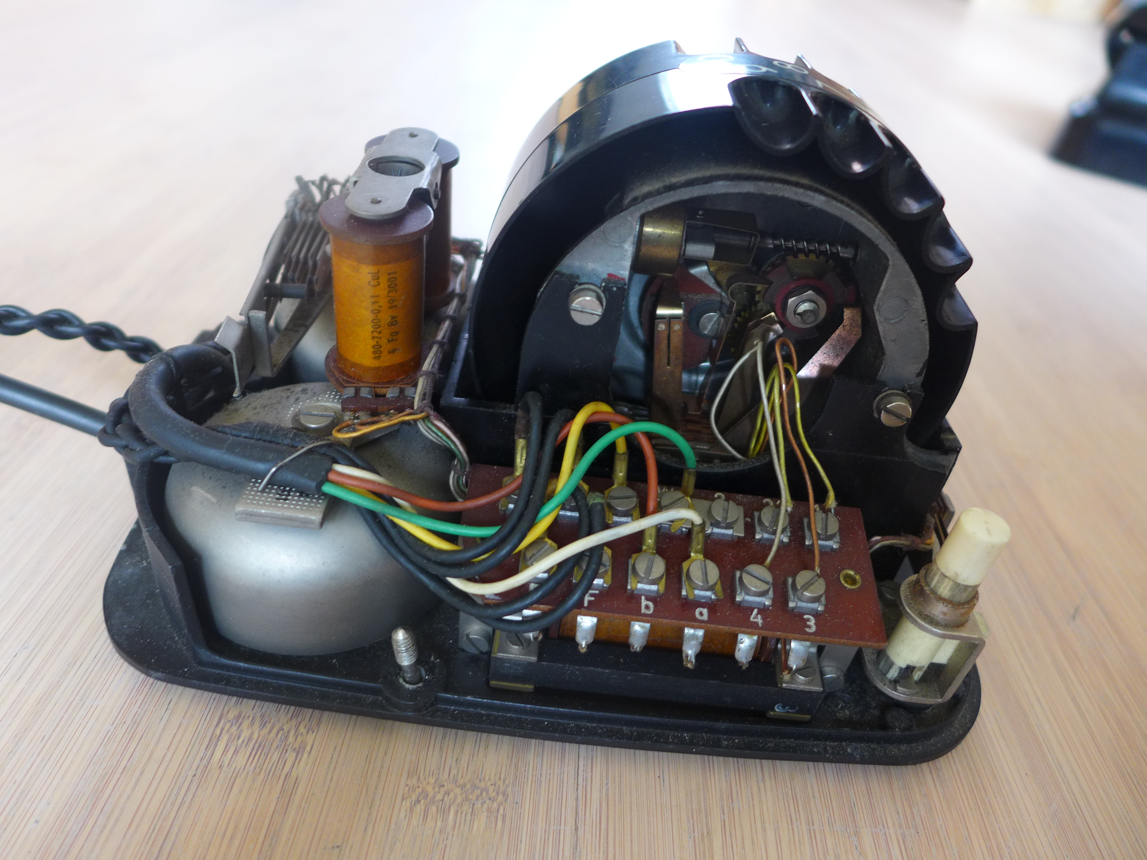 Hierbei handelt es sich um einen geöffneten Trommelwähler der Firma Siemens und Halske